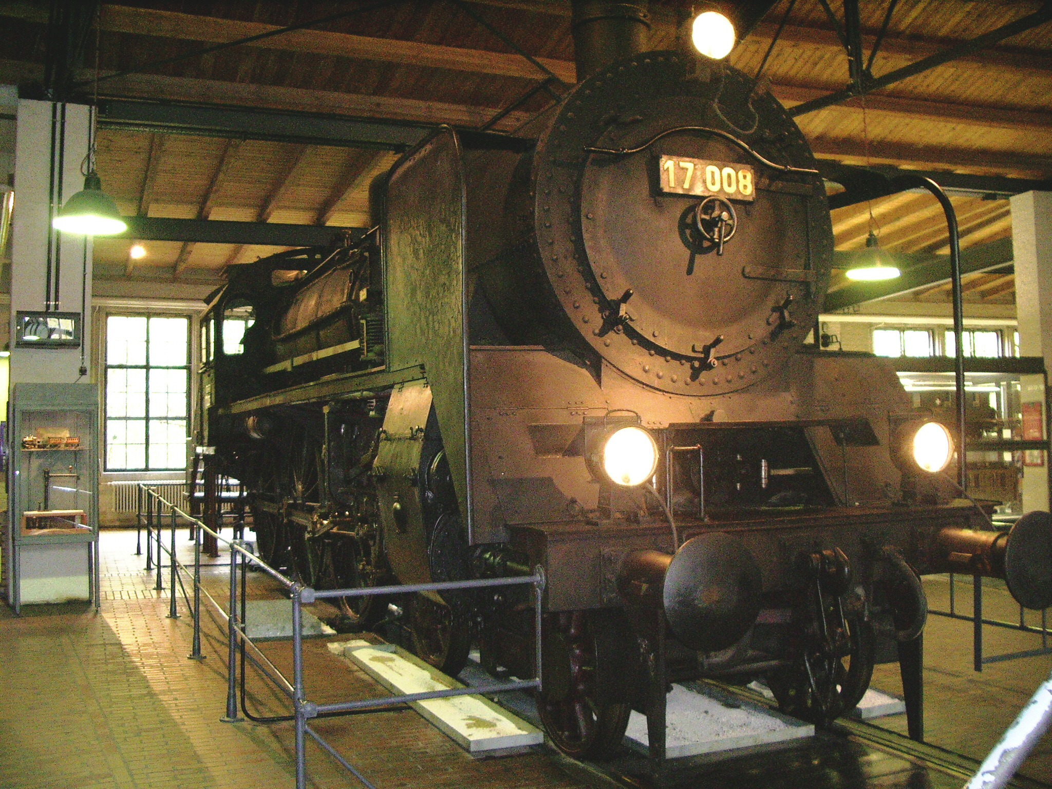 Preussische S 10 aus dem Jahr 1911, in Dienst gestellt als "Breslau 1008" und ab 1925 als "17 008" geführt. 1933 im Hauptbahnhof Düsseldorf stationiert, 1934 ausgemustert und im Ausbesserungswerk Brandenburg-West als Ausstellungsstück hergerichtet. Heute im Deutschen Technikmuseum Berlin.